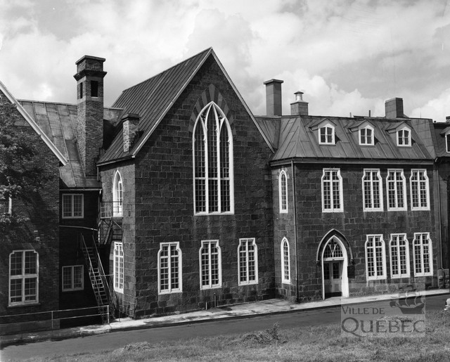 Vue du conservatoire de musique et d'art dramatique situé sur l'avenue Saint-Denis, Ville de Québec, Canada.